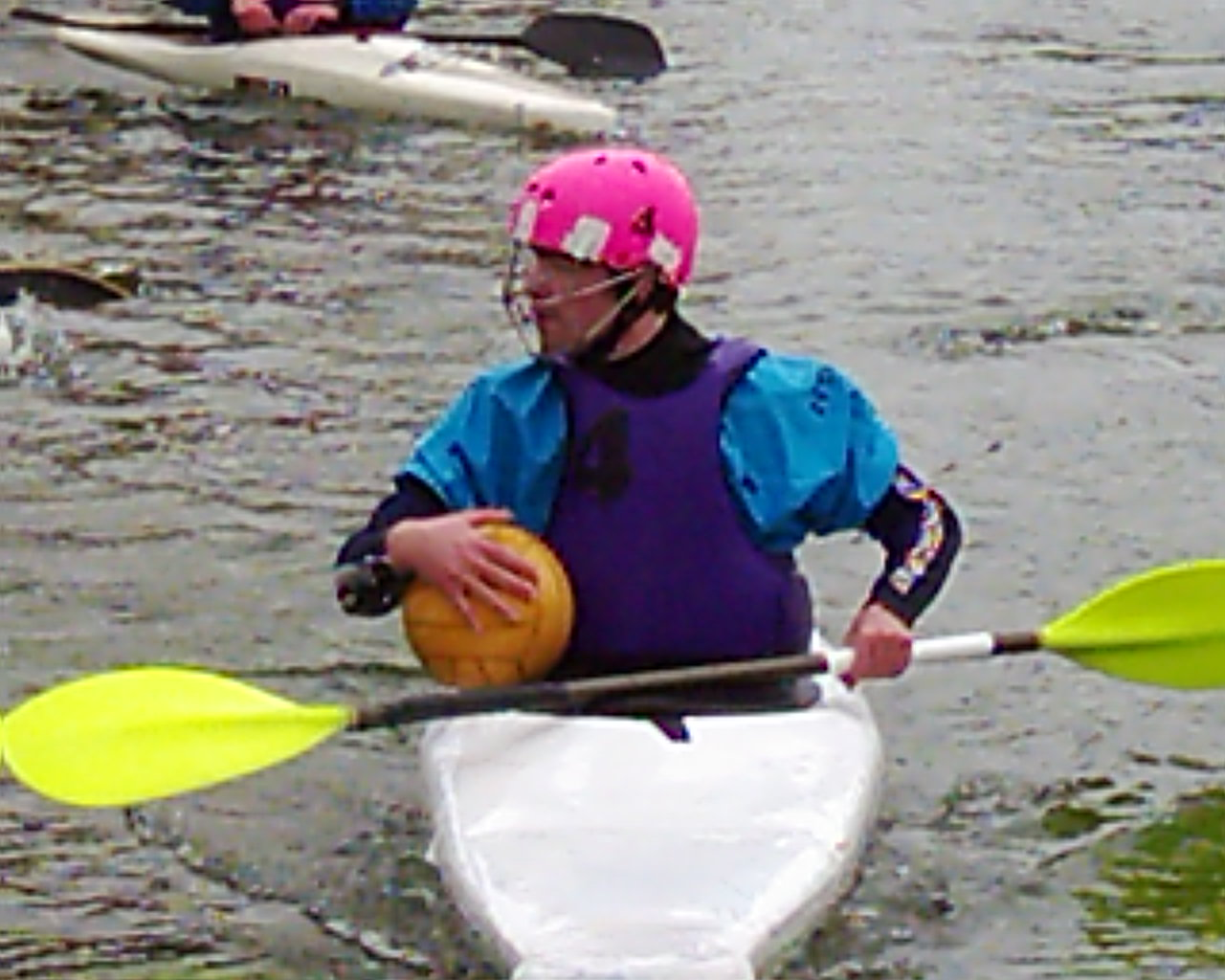 Joueur de kayak-polo - France, décembre 2003